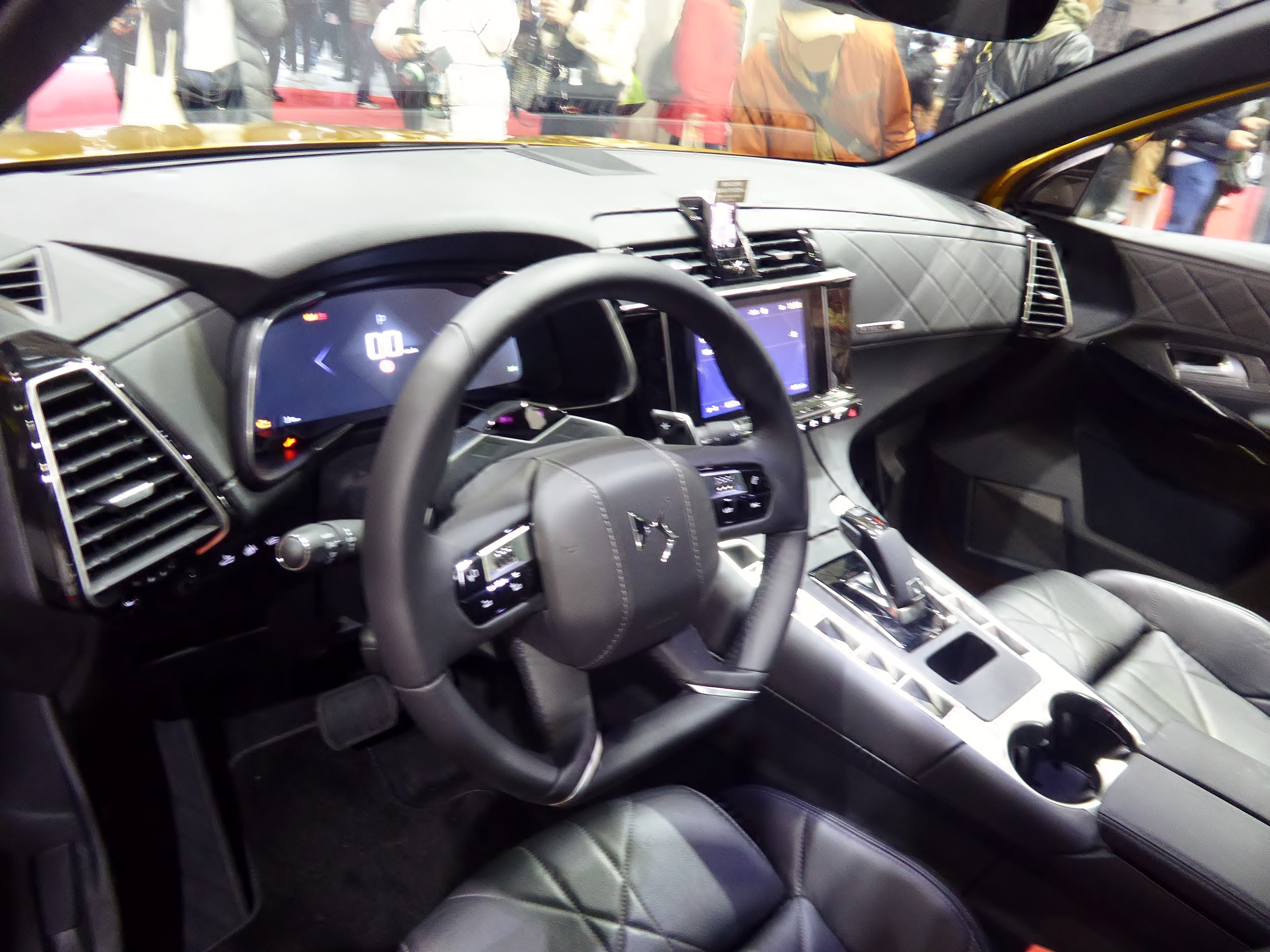 大阪モーターショー2017に於いてDS7クロスバックコンセプトを撮影。